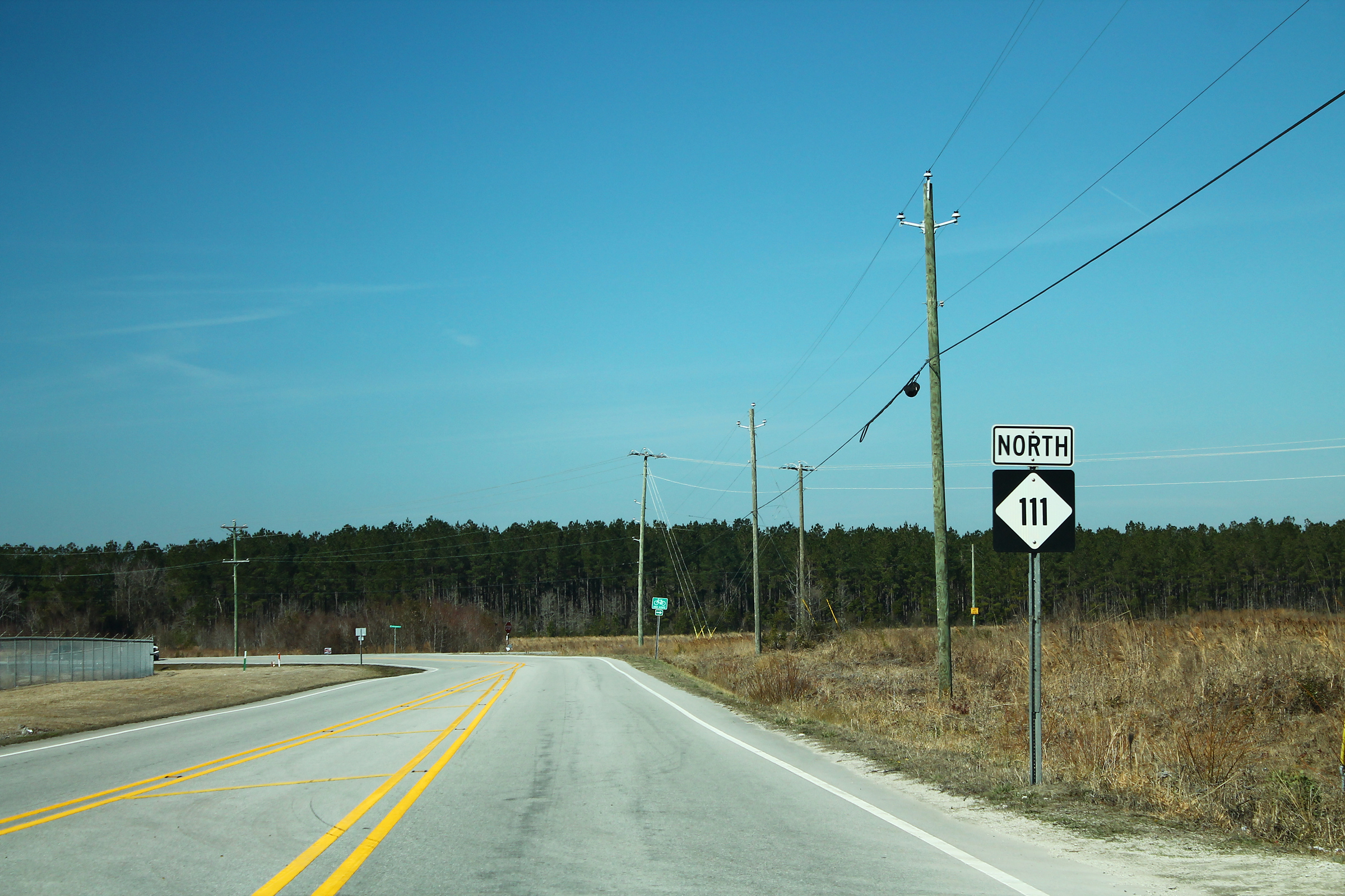 NC 111 Sign